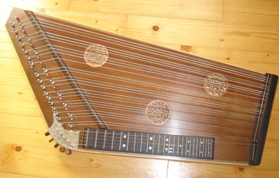 Psalterzither von Ernst Volkmann quote from caption on Zither: "moderne Konzertzither in Psalterform von Ernst Volkmann"